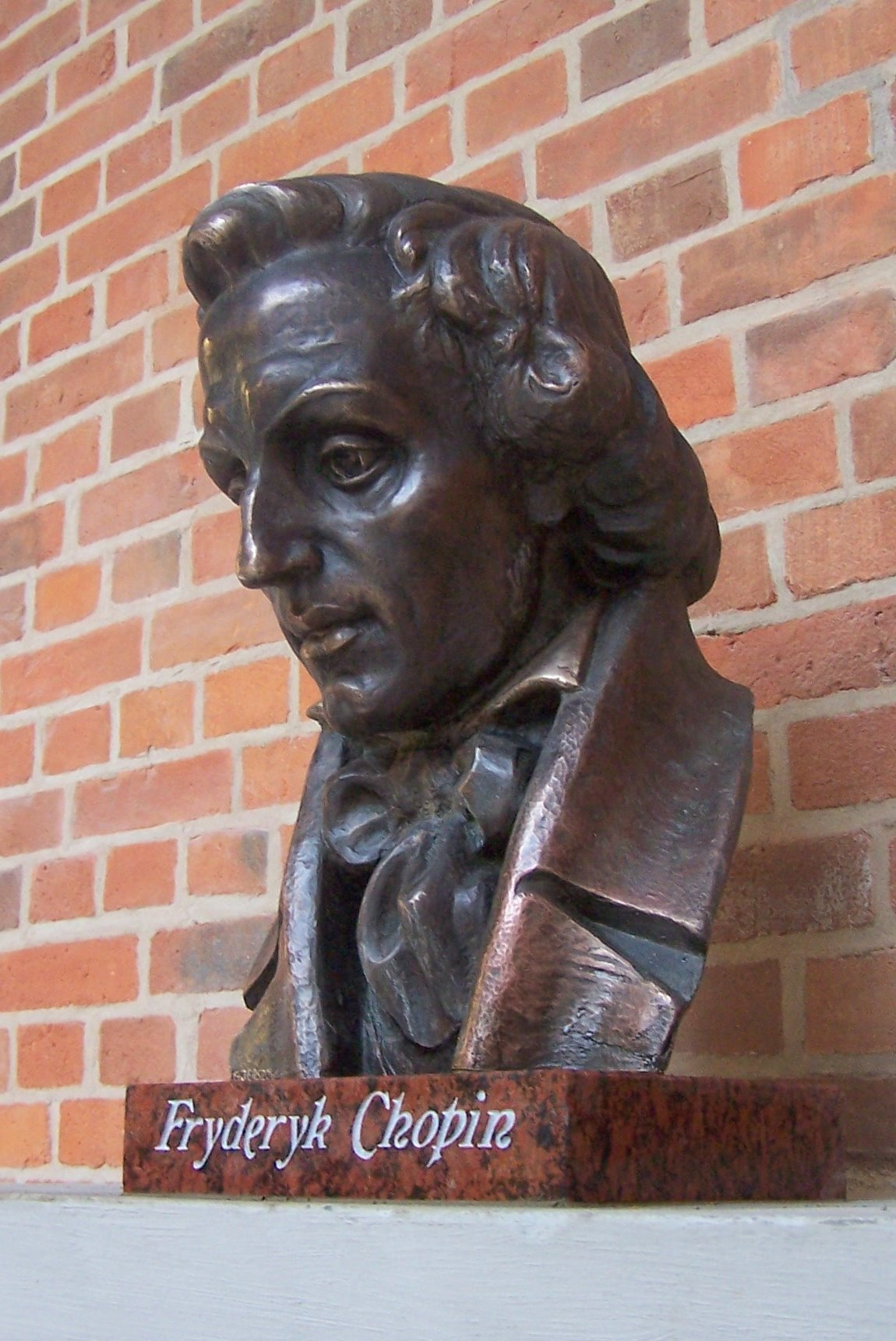 Fryderyk Chopin autorstwa Gennadija Jerszowa. Filharmonia Baltycka w Gdańsku